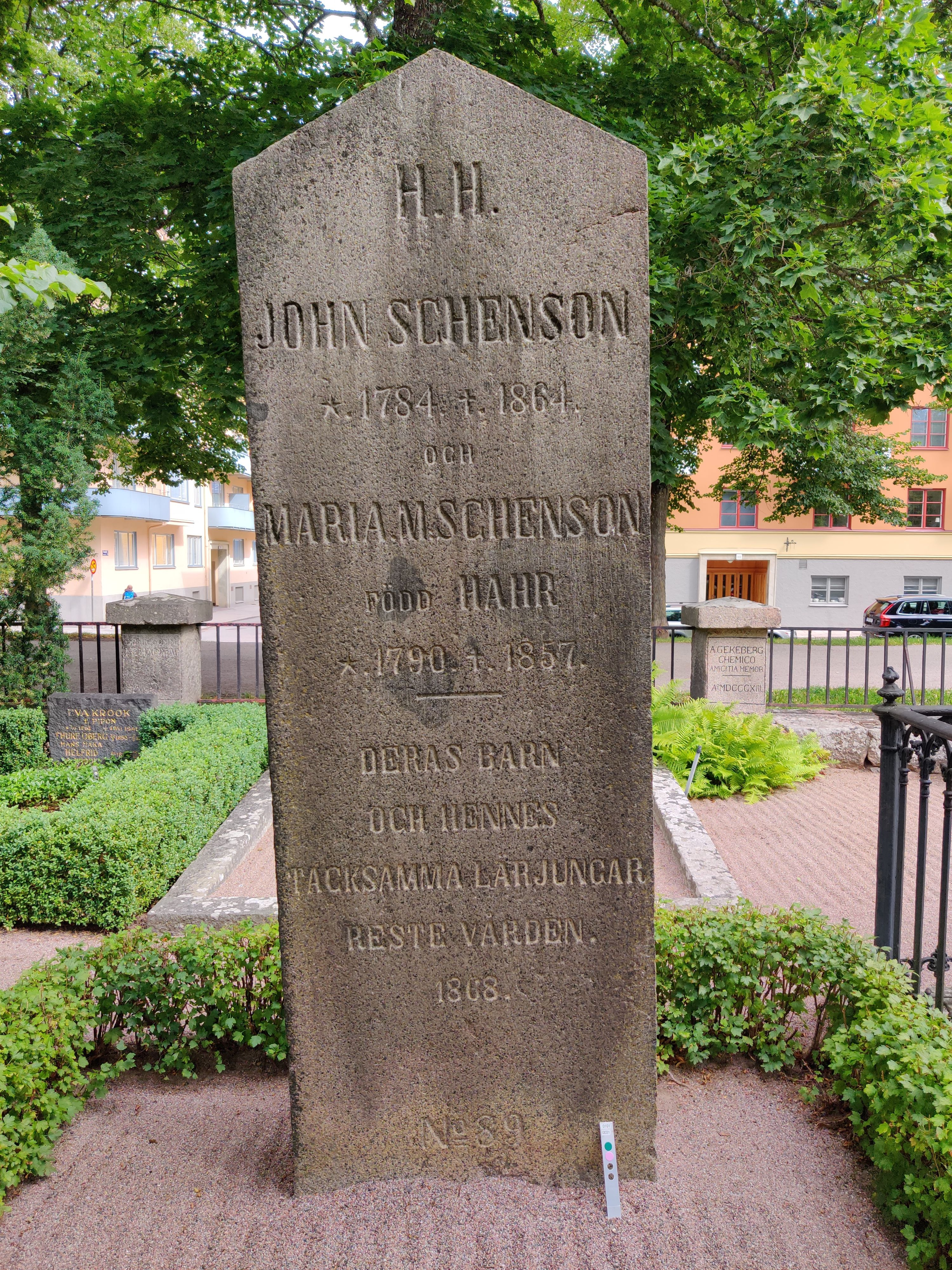 Emma Schenson, ca 1865-ca 1875.